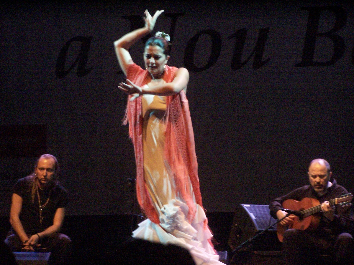 Flamenko dansı.